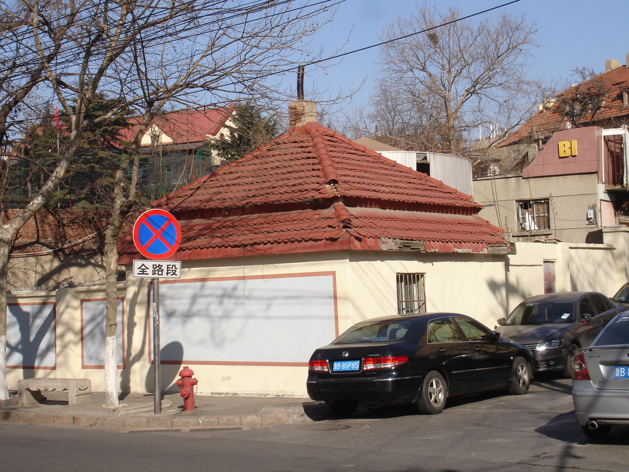 尊孔文社藏书楼附楼